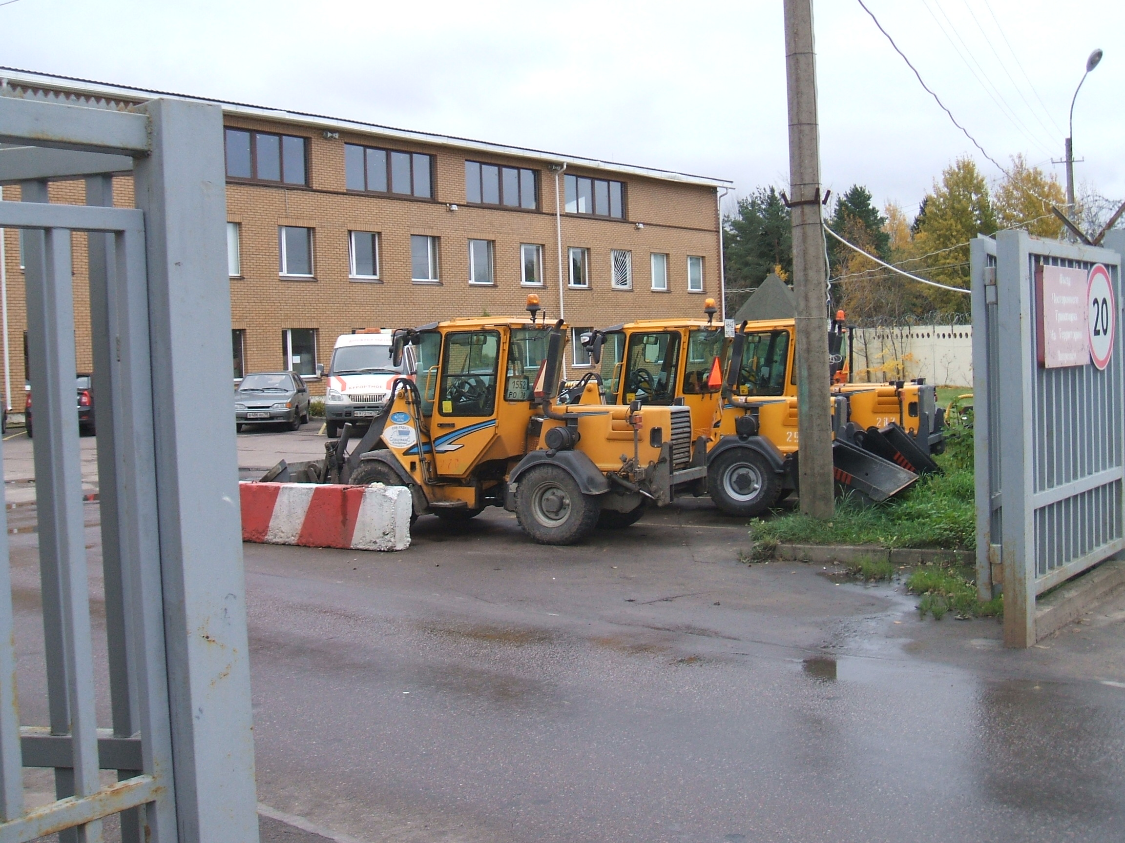 Сестрорецк СПб Техинка предприятия Спецтранс